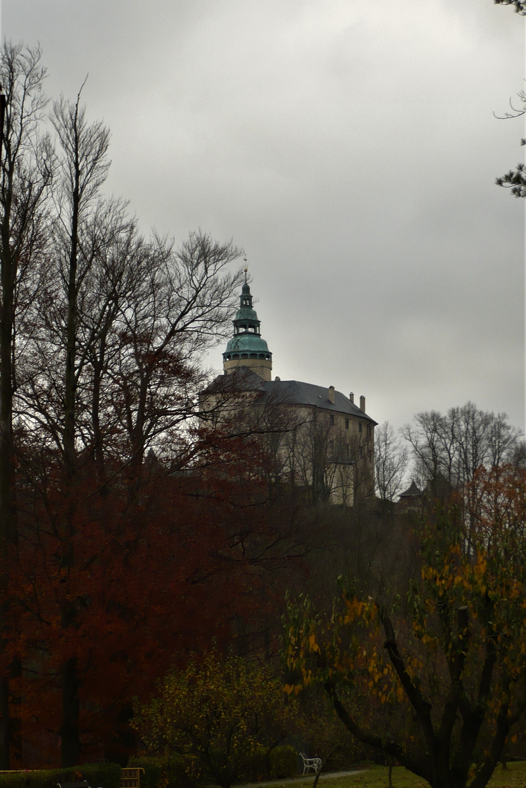 Frýdlant